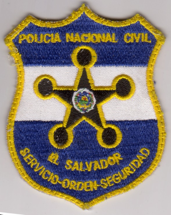 El salvador police patch